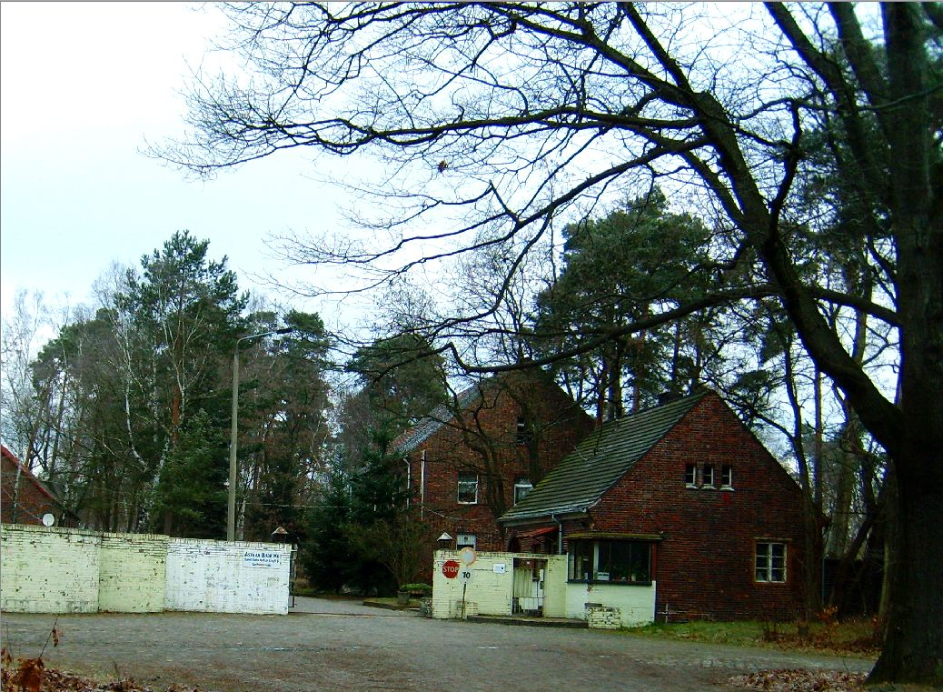 Einer der einstigen Eingänge der Muna in Hohenleipisch.